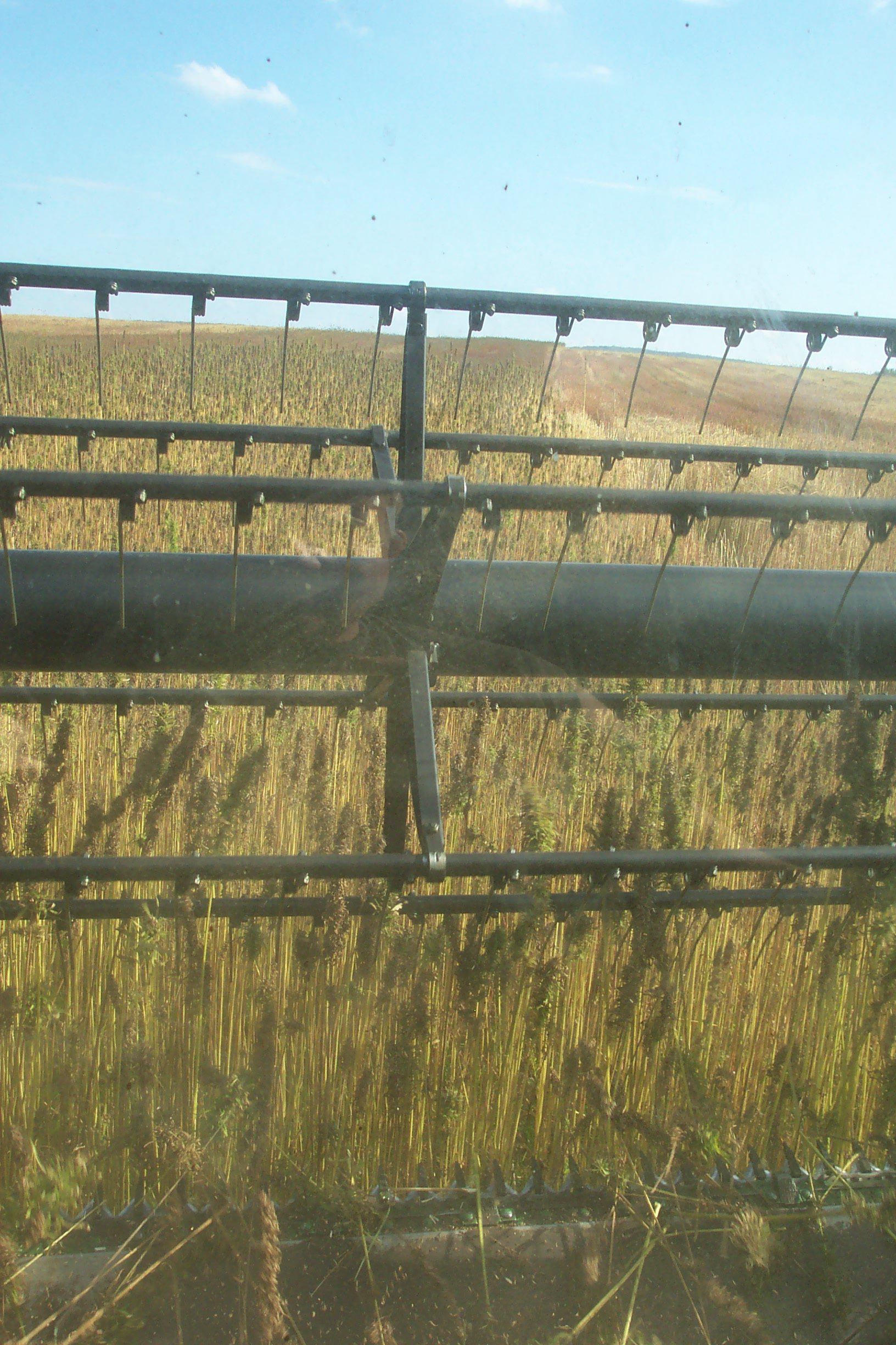 Moisson du chanvre industriel en Haute-Saône, avec une moissonneuse-batteuse adaptée.